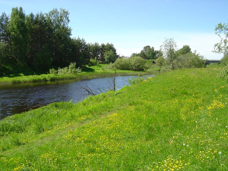 Река Тифина